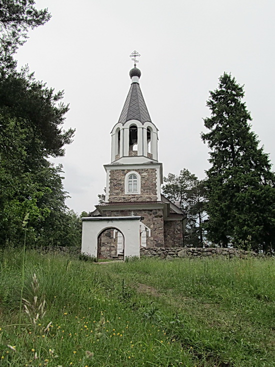 Вялікая Кракотка. Царква Раства Багародзіцы